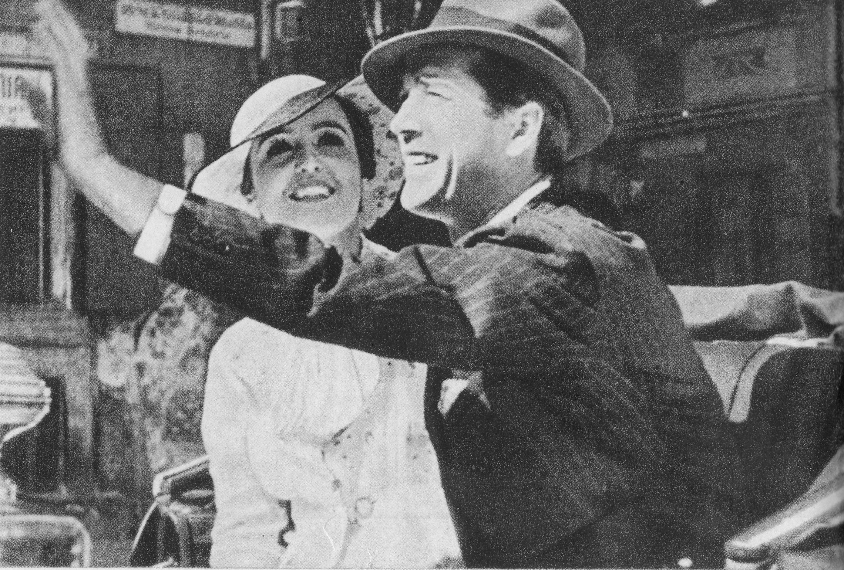 Jadwiga Smosarska i Jerzy Pichelski na rynku Starego Miasta